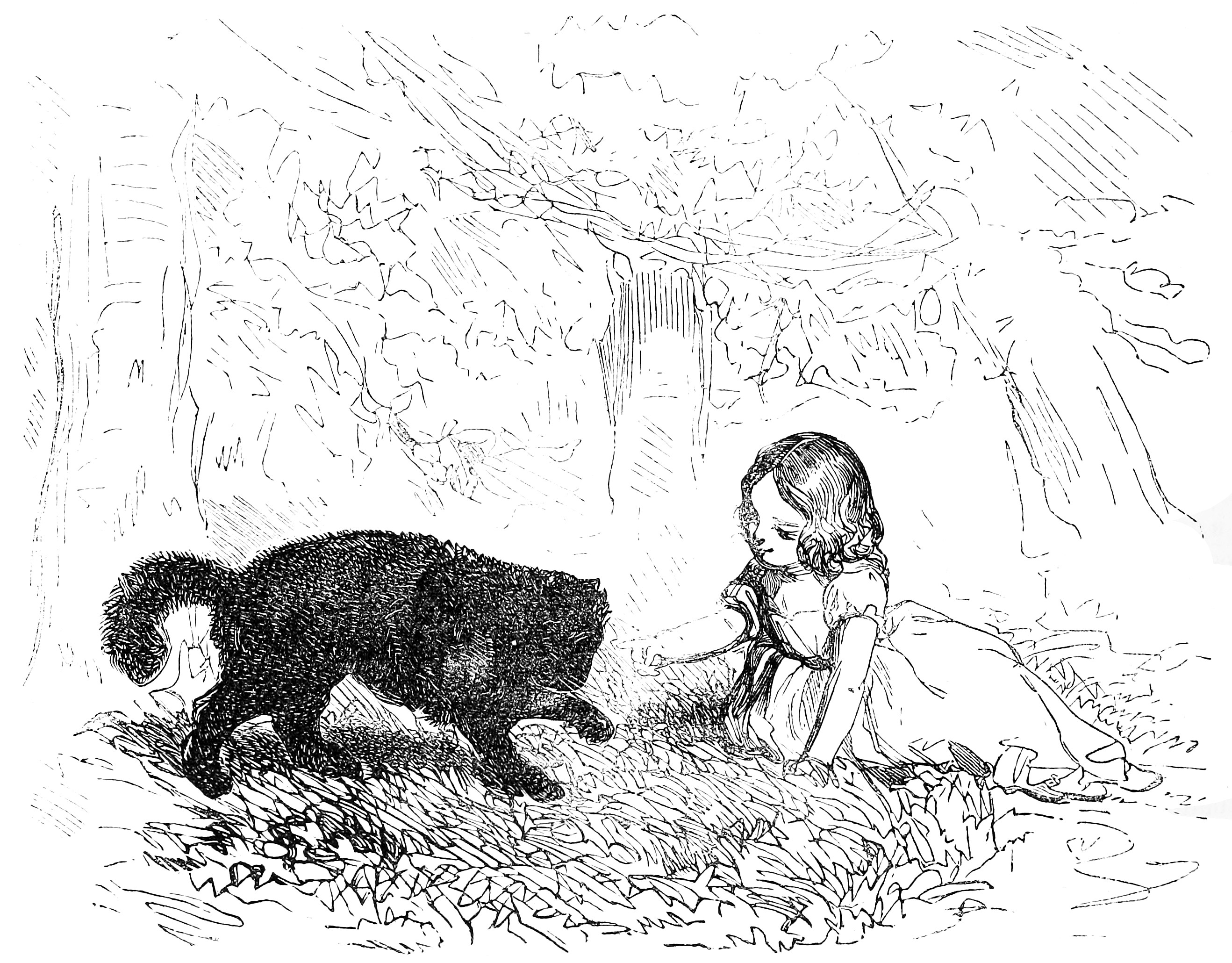 Illustration du Dictionnaire infernal par Louis Le Breton